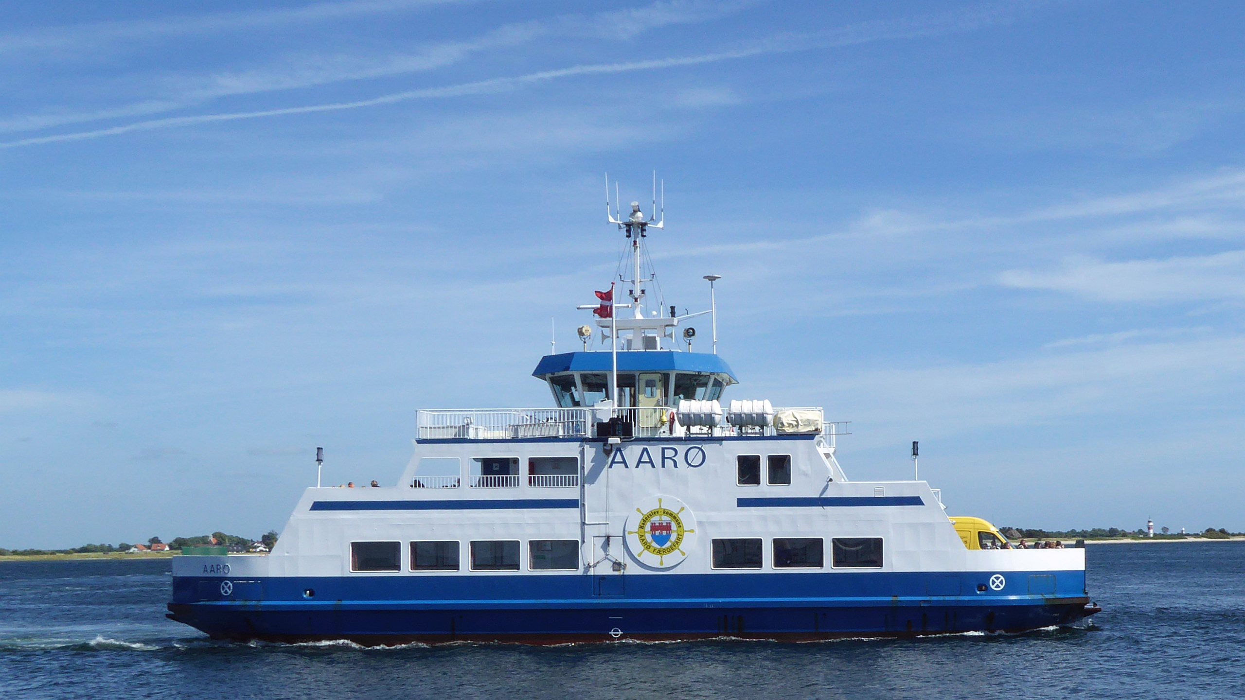 AARØ færge fra Årøsund havn til Årø, Sønderjylland, Syddanmark - Fähre zur Insel Årø Jütland Dänemark Foto Wolfgang Pehlemann P1210003.jpg